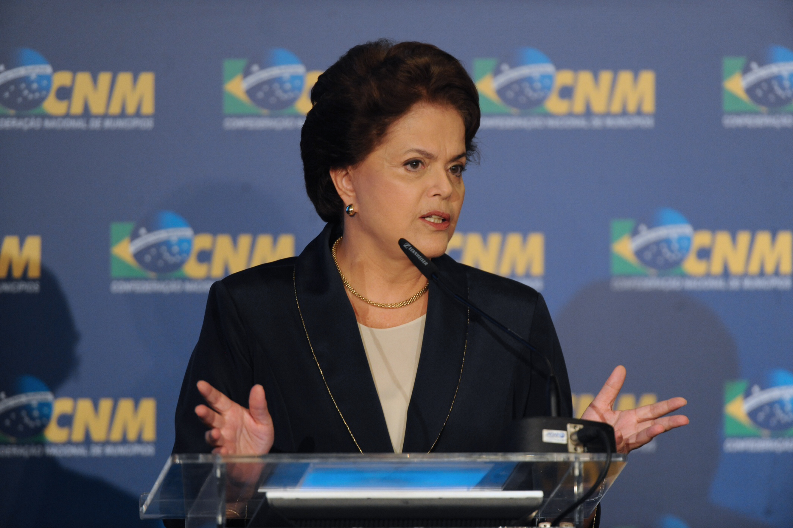 Presidenta Dilma Rousseff discursa durante cerimônia de abertura da 14ª Marcha a Brasília em Defesa dos Municípios